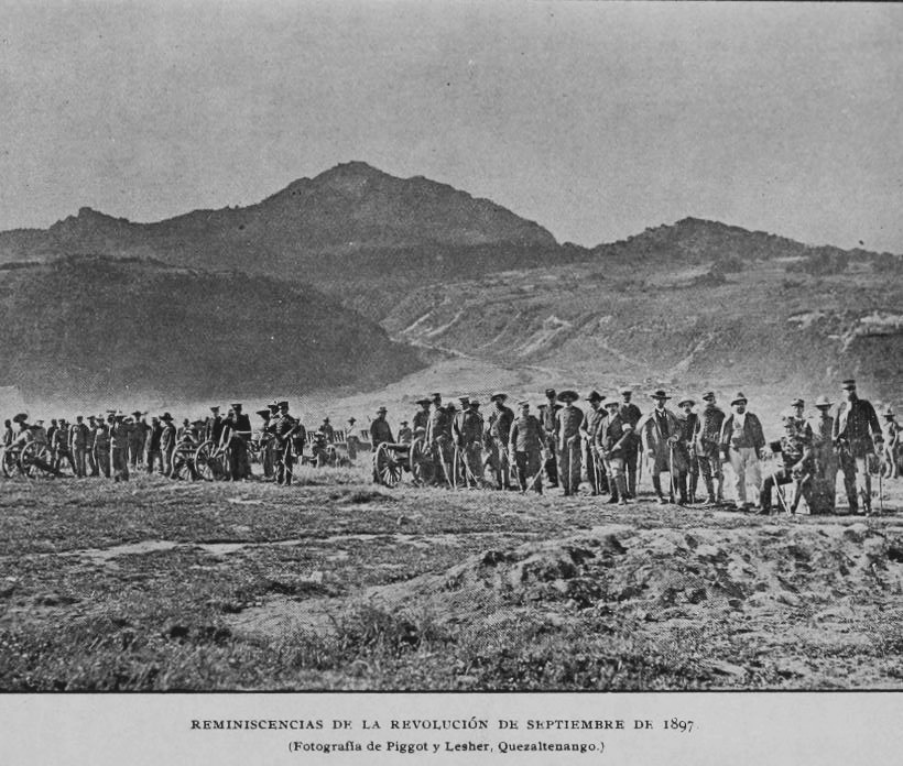 Campo de batalla de la Revolución Quetzalteca en 1897.